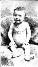 Retrato de Miguel de los Santos Oliver